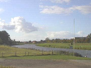 De Vecht bij Ommen, eigen foto